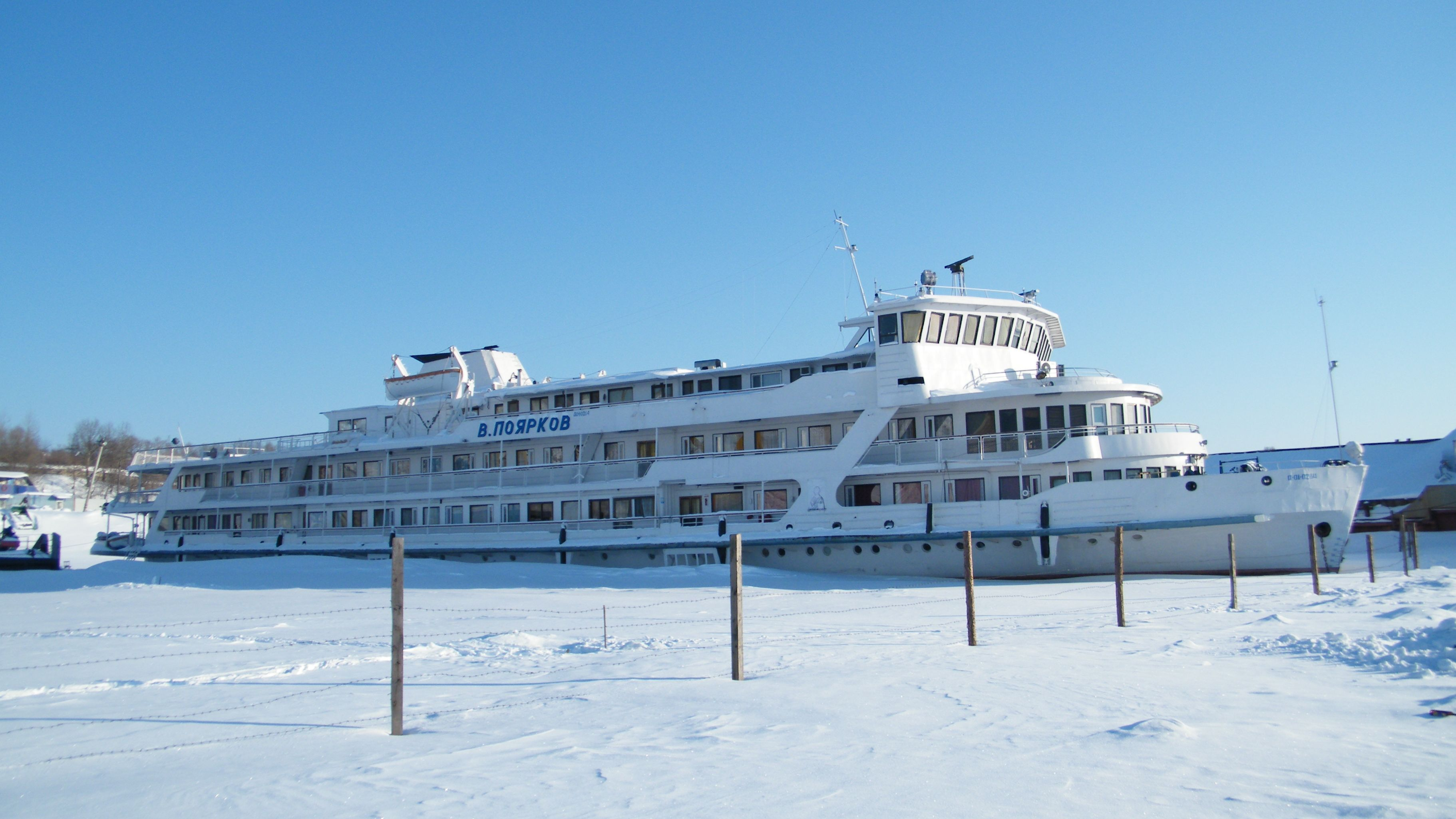 V. Poyarkov (ship, 1960)